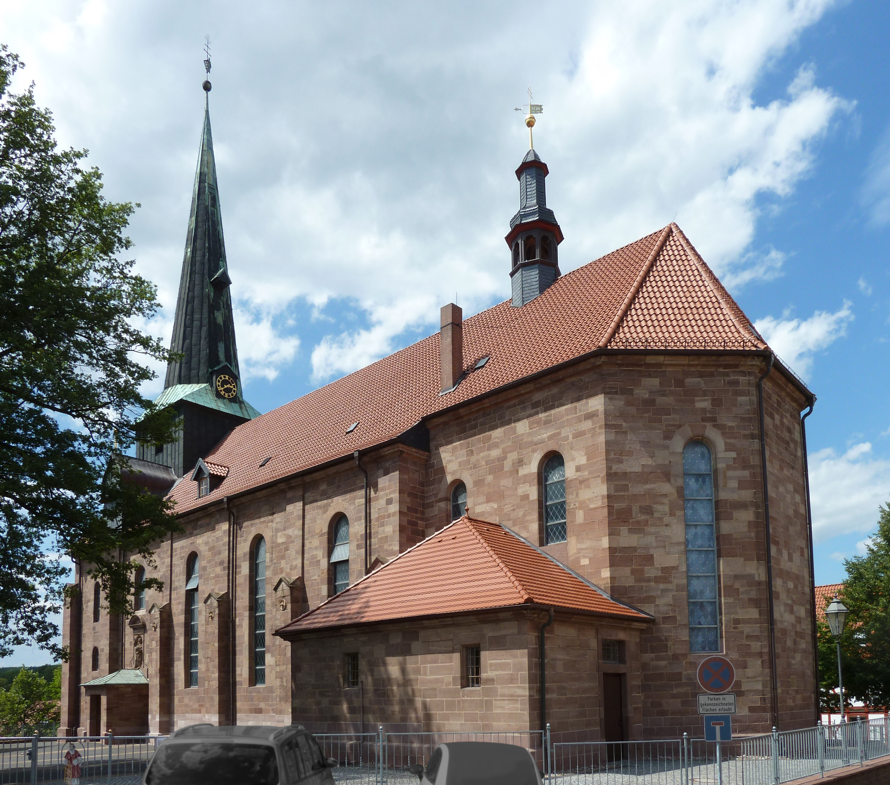 Katholische Kirche St. Laurentius in Gieboldehausen, Untereichsfeld. Erbaut 1727–29 unter Verwendung von Resten der gotischen Vorgängerkirche nach Plänen von Philipp Kersten.